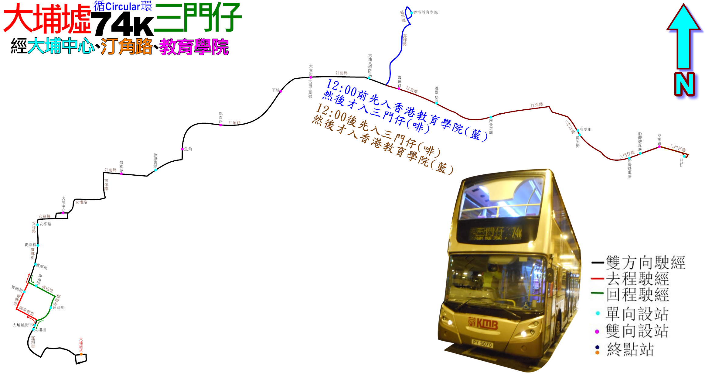 中文（香港）: 九巴74K線的走線圖